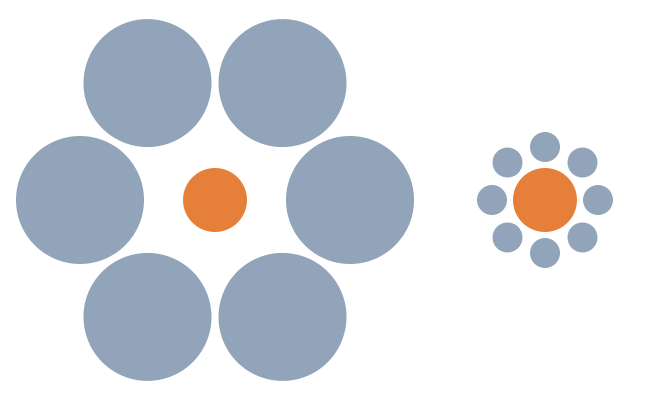 Ebbinghaus İllüzyonu. Turuncu daireler eşit boyutta olmalarına rağmen farklı boyuttta gözükür.